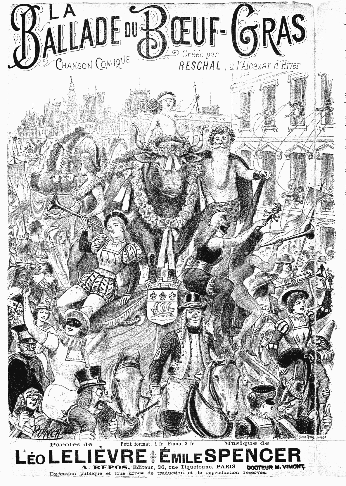 Le cortège carnavalesque du Bœuf Gras.